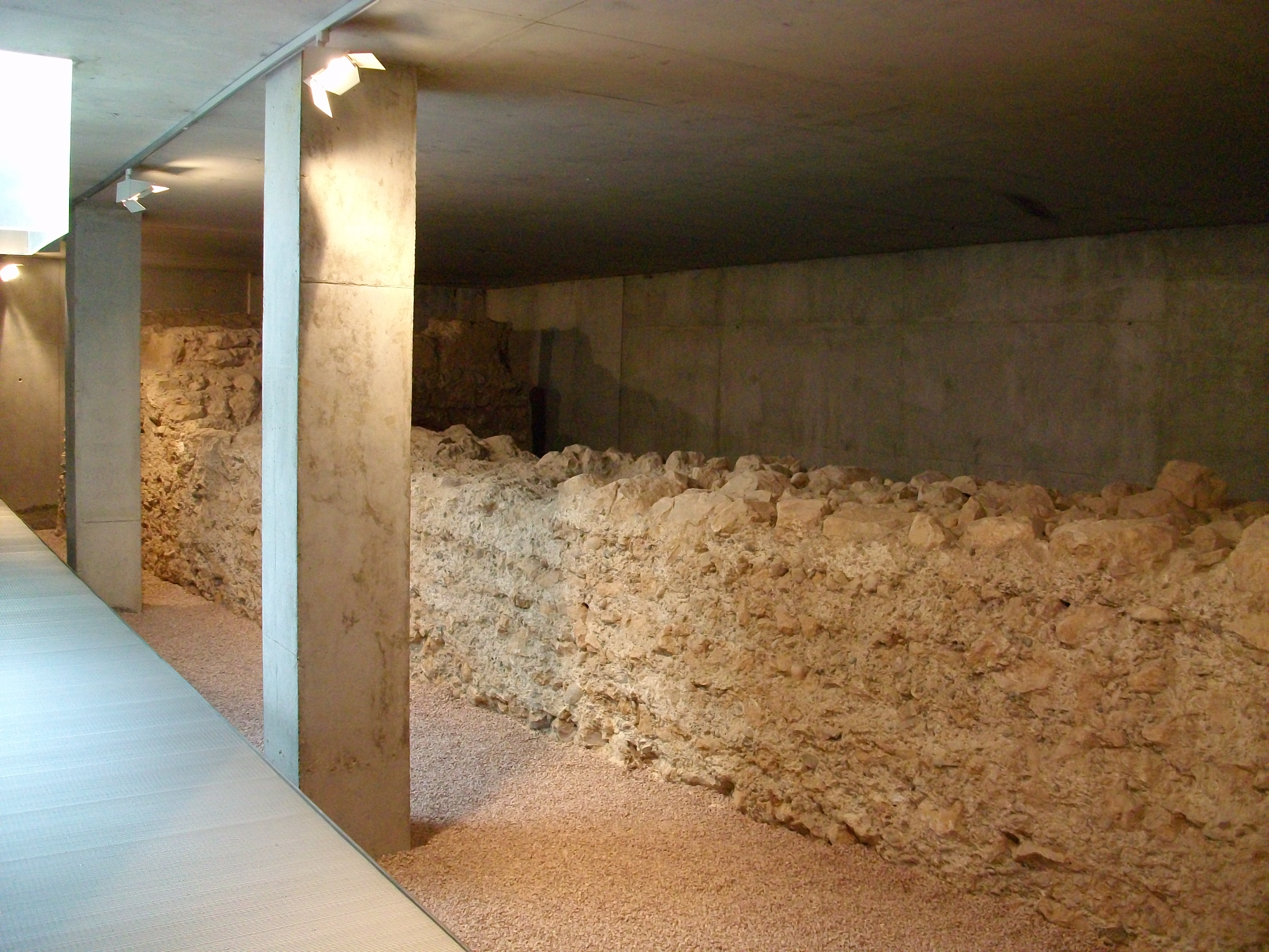 Restes d’una torre islàmica de les darreries del segle XII o els inicis del XIII conservades al subsòl del MUVIM. Esta torre no formava part de les muralles de València: si bé el cinturó emmurallat de 1365, era una de les construccions solitàries que protegien la ciutat islàmica a distància